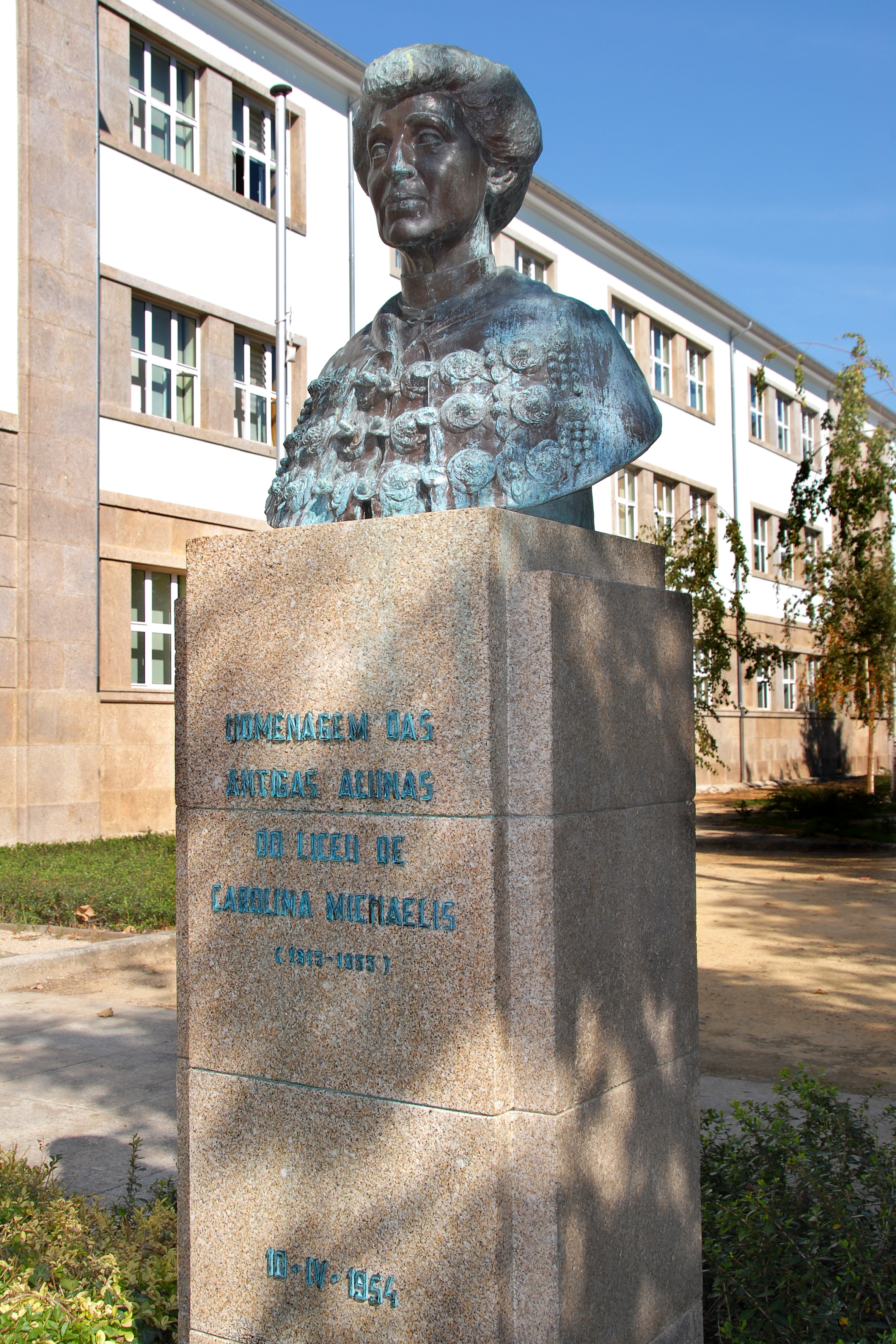 Escola Secundária Carolina Michaelis This file was uploaded for Wiki Loves Monuments in Portugal with the unique identifier 10949521.